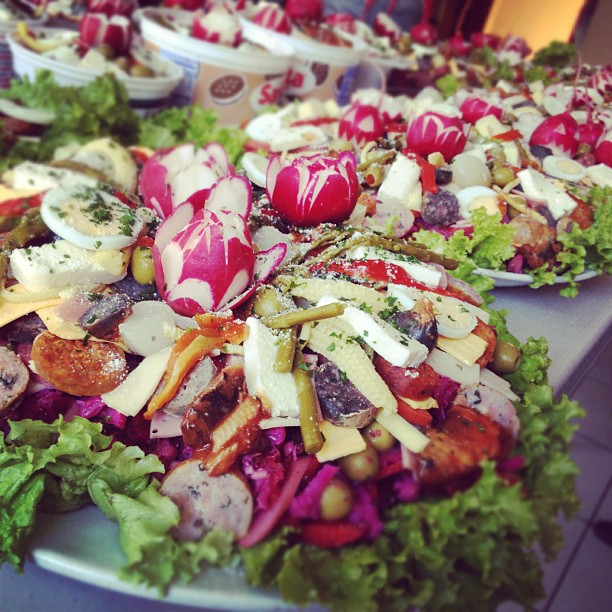 Fiambre